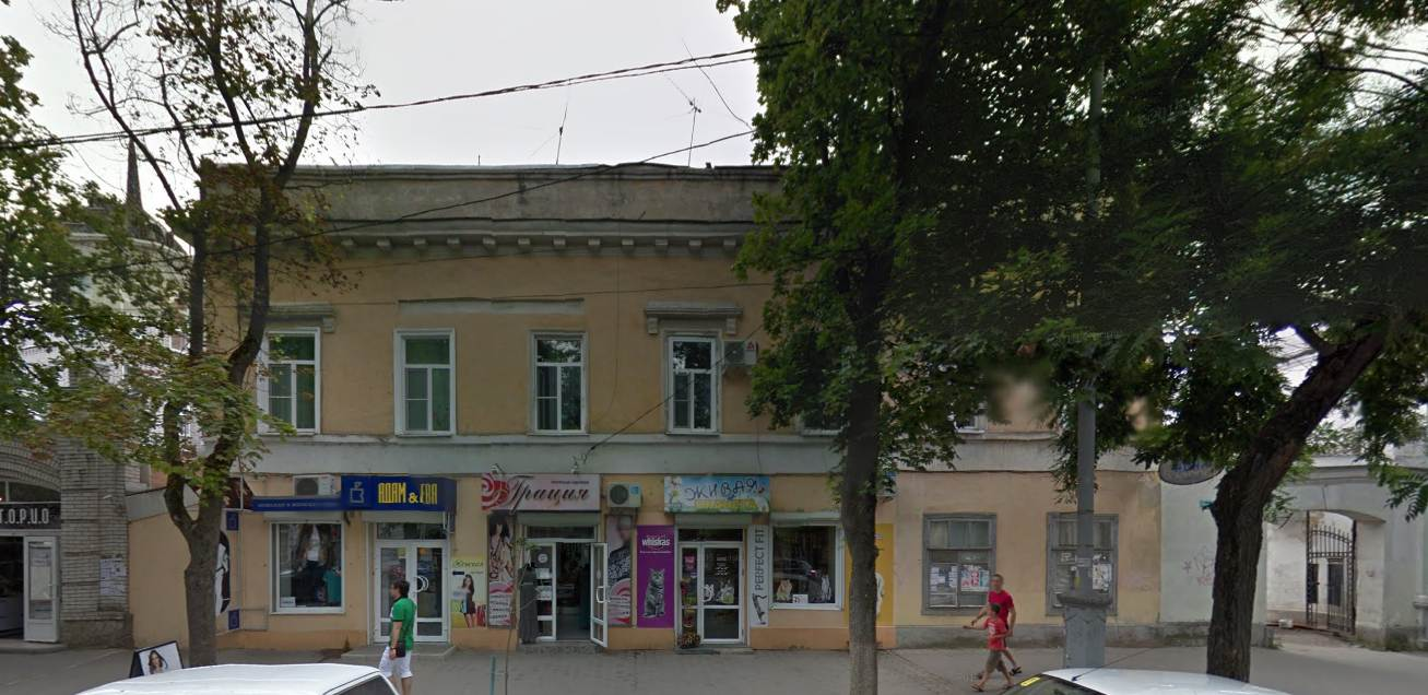 "Дом Краснушкина", Таганрог, 2012